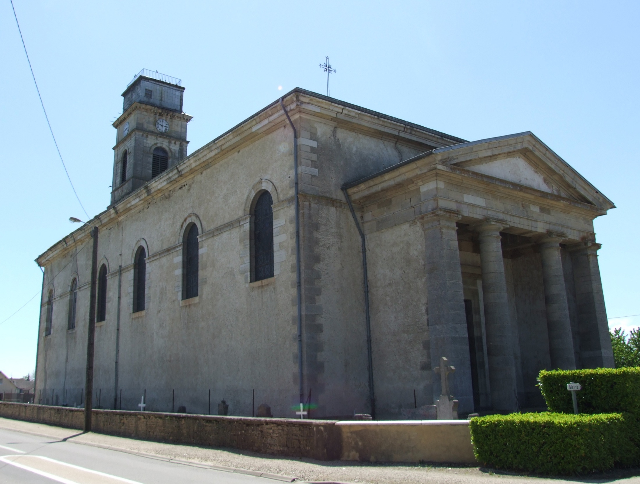 Eglise Saint-Martin, Arc-sur-Tille, Côte-d'Or, Bourgogne,FRANCE